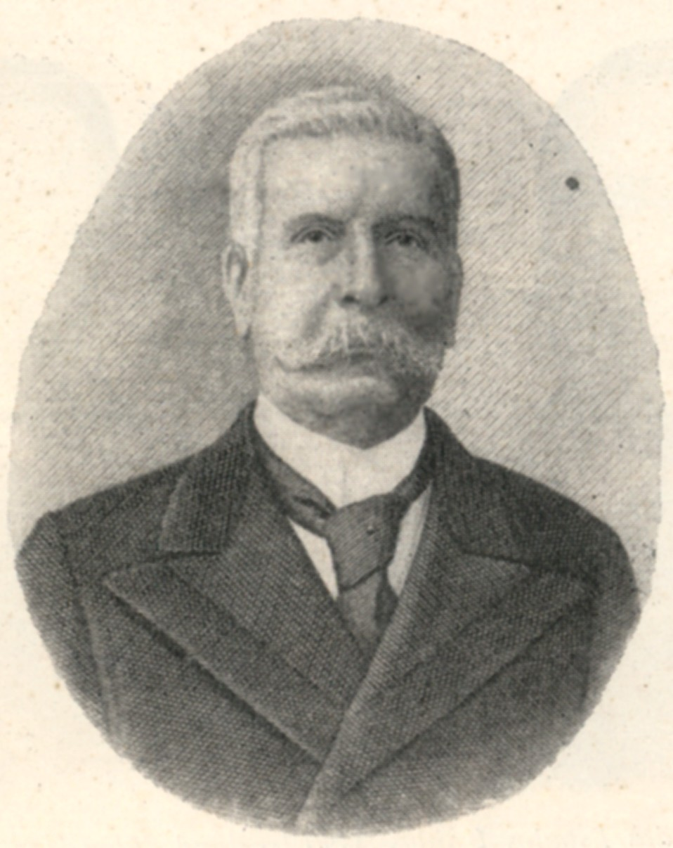 Porfirio Diaz